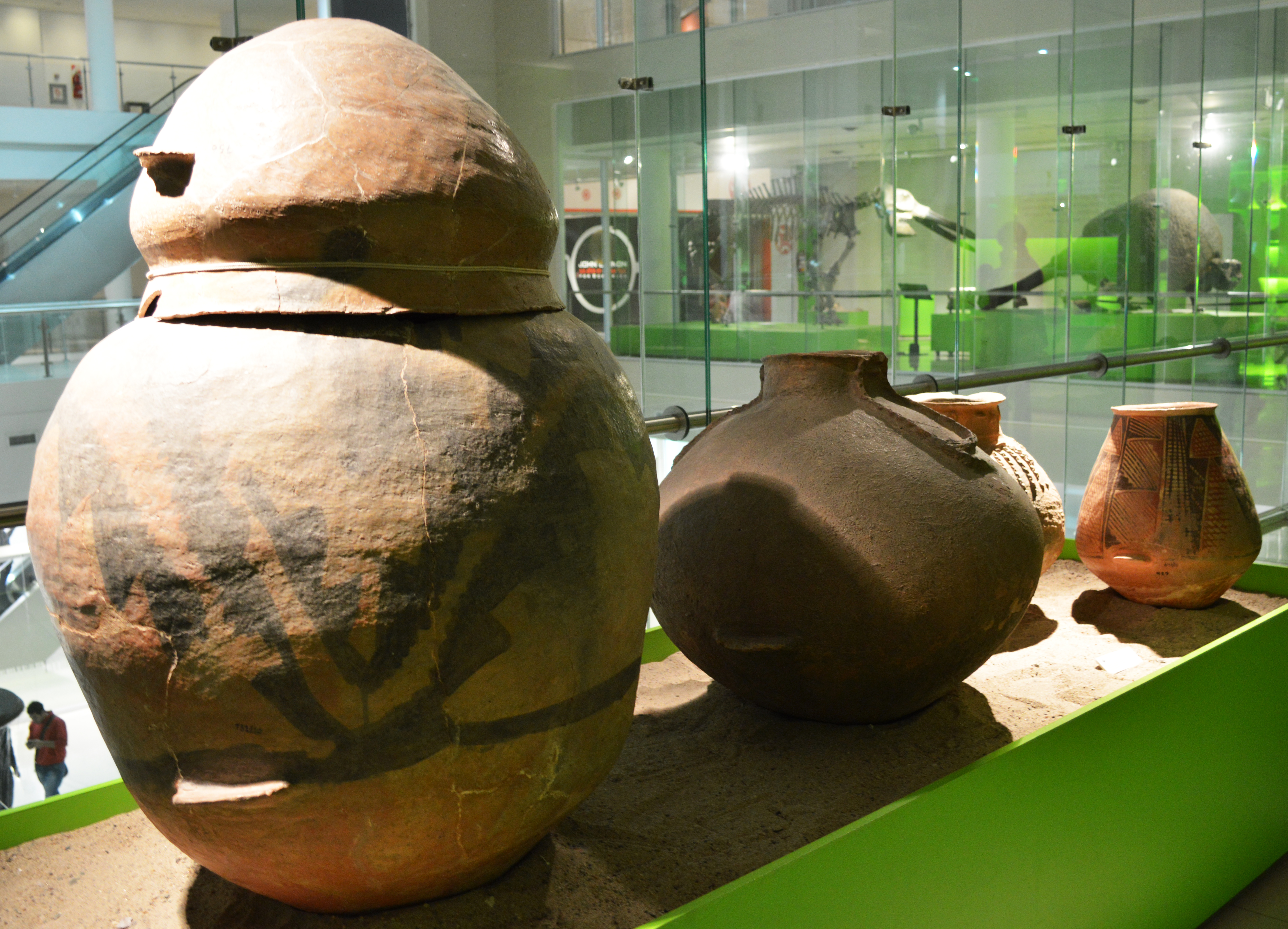 Alfarería indígena.